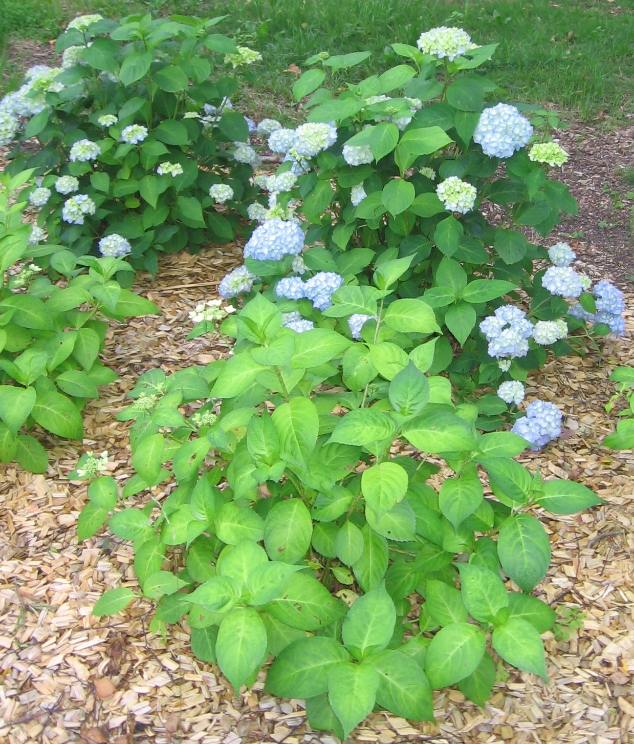 Hortensja krzewiasta w ogrodzie botanicznym w Zielonej Górze